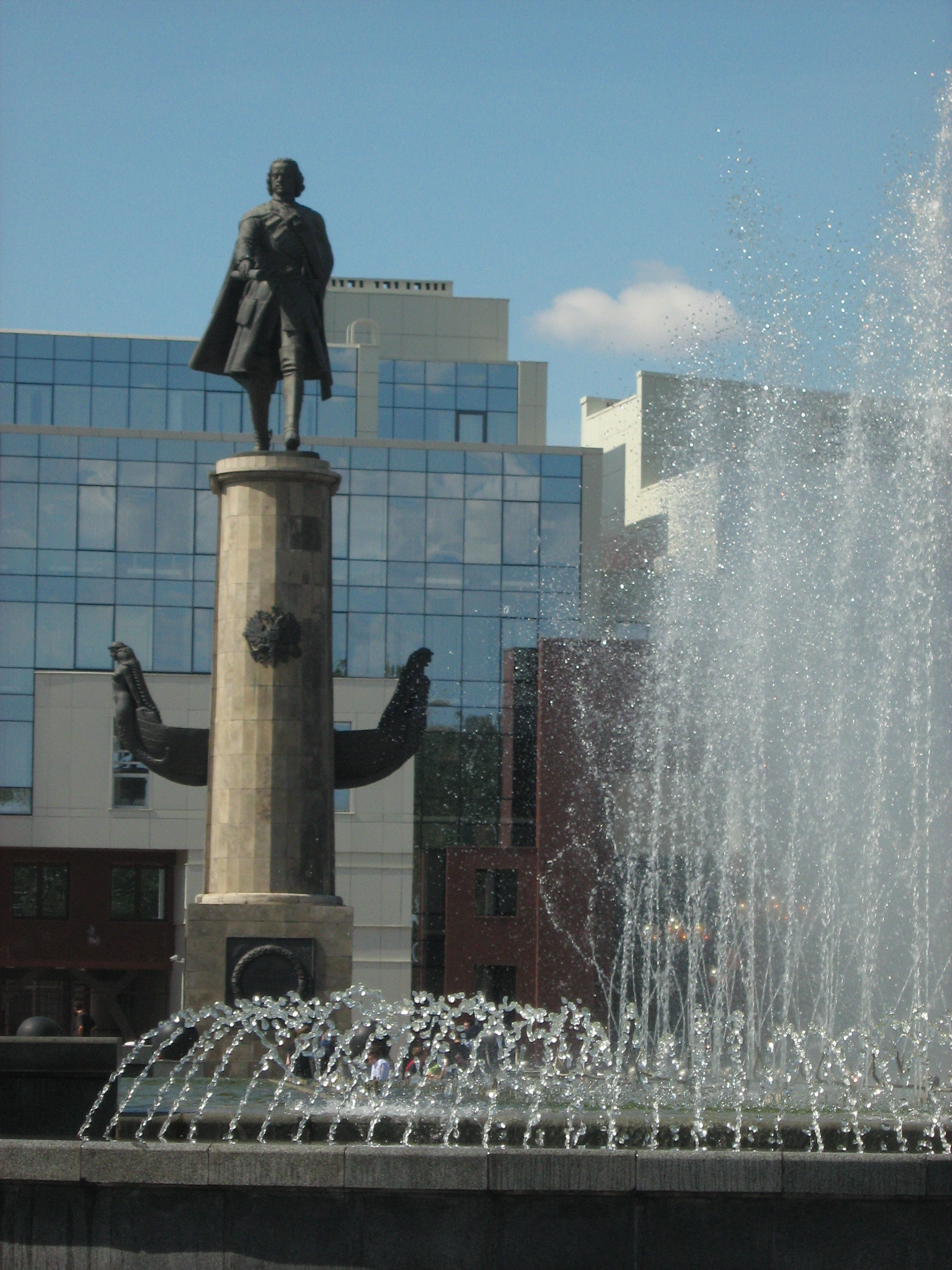 Памятник петру первому возле Нижнего парка ( Липецк )